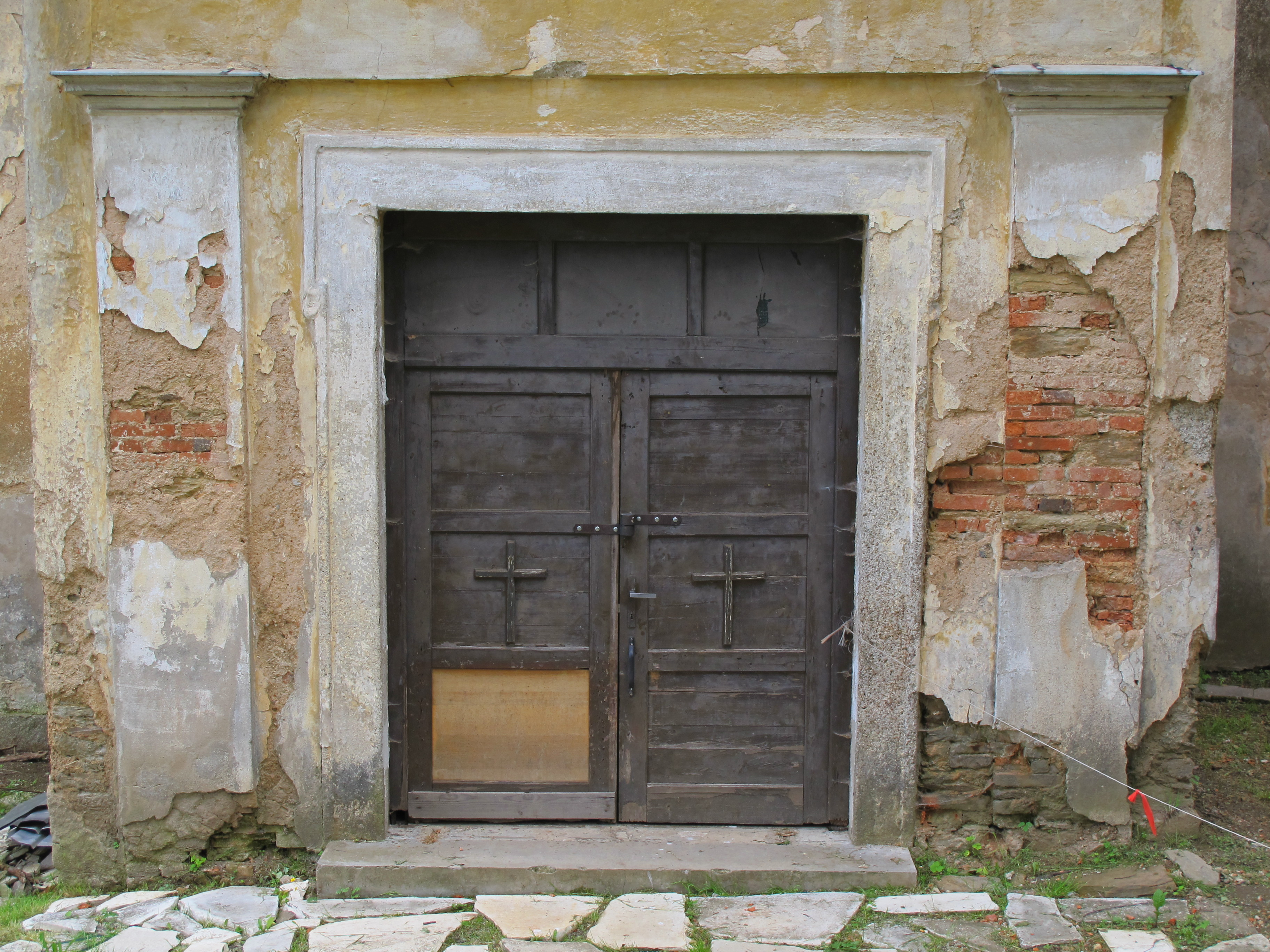 Kostel svaté Anny, Palič. This image was acquired during the event Wikiměsto Mariánské Lázně.